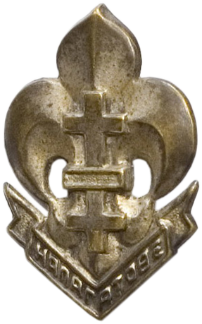 Беларуская (тарашкевіца): Значка-сымбаль Згуртаваньня Беларускіх Скаўтаў на Чужыне (1945-1950-е)